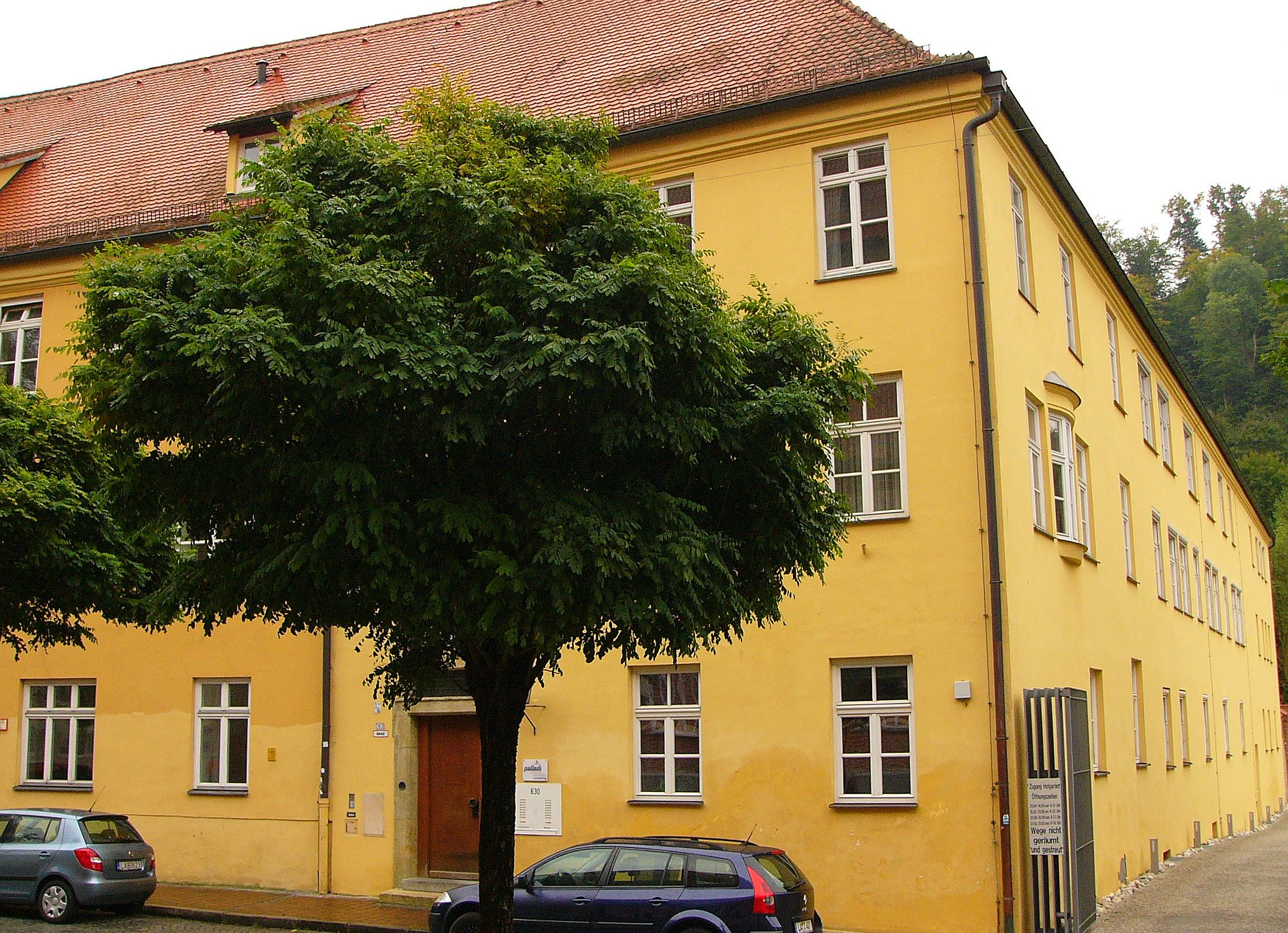 Ehem. Franziskanerinnenkloster Hl. KreuzThis is a photograph of an architectural monument.